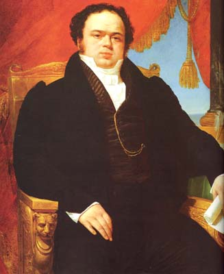 Retrato del chileno Mariano Egaña realizado en París en 1827. Egaña fue el principal redactor de la Constitución de Chile de 1833